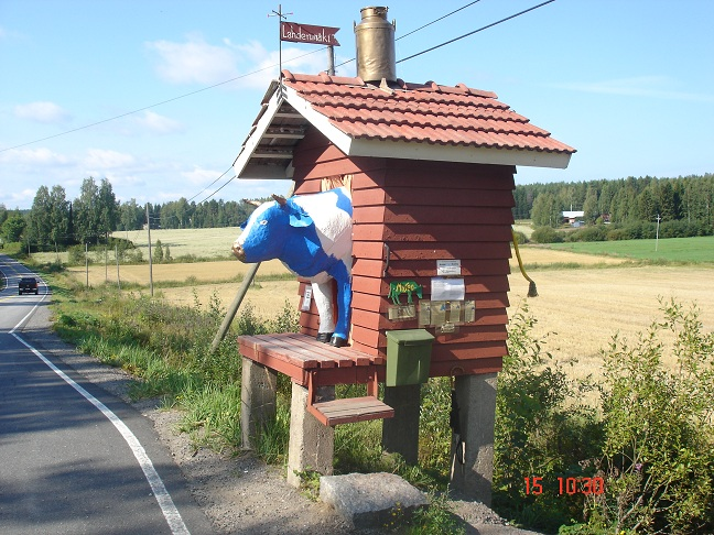 Maitolaiturimuseo Velaattan kylässä Tampereella